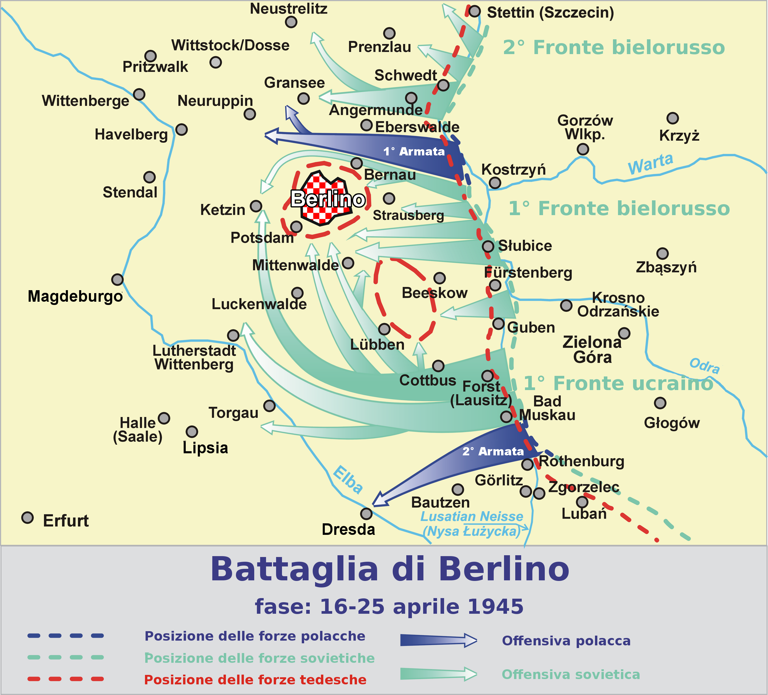 Traduzione in italiano